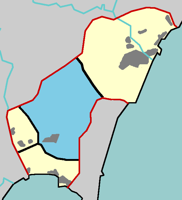 Distrito Centro de San Roque (Cádiz)